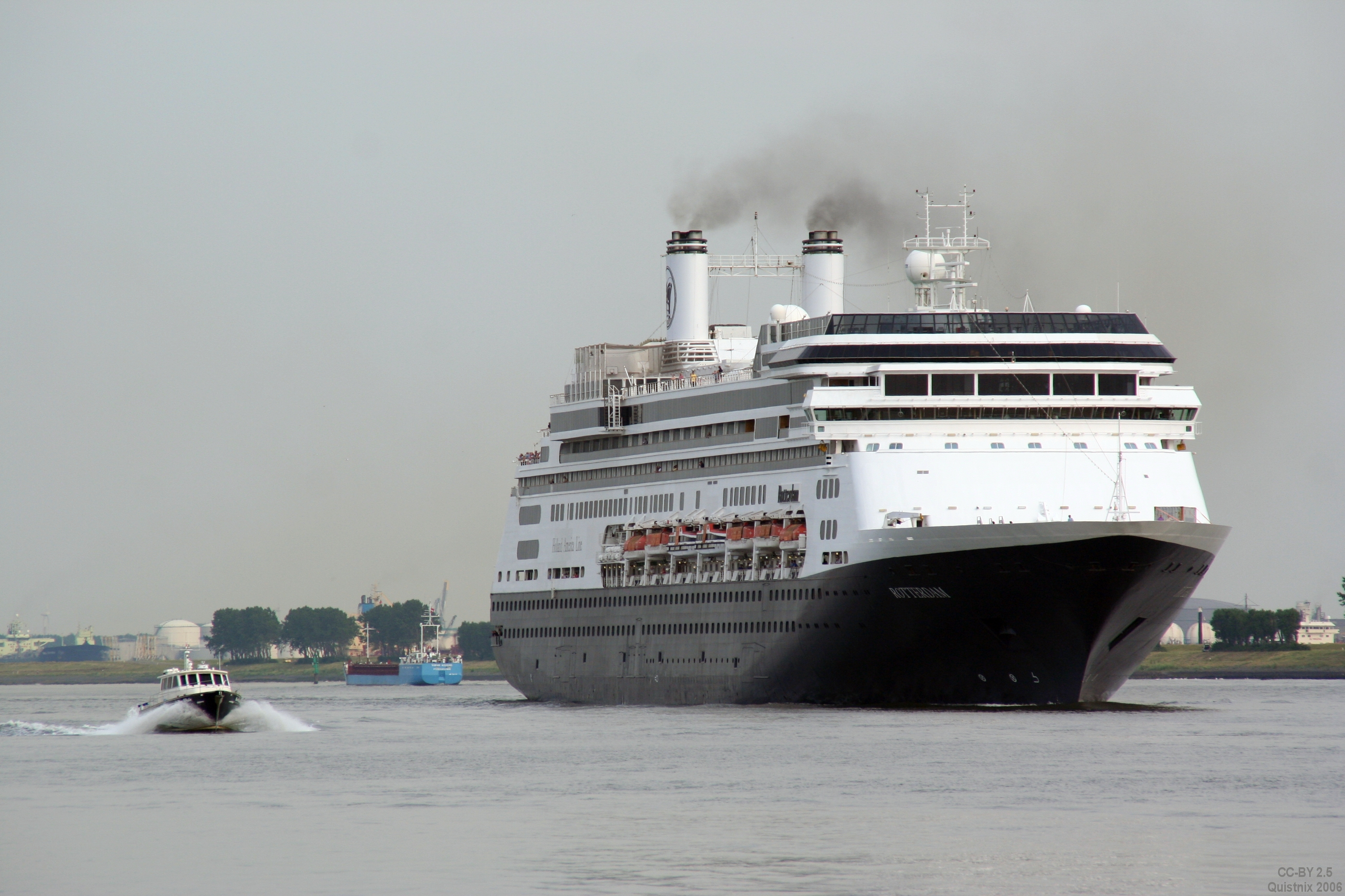 M.S. "Rotterdam" vaart de Nieuwe Waterweg af. Foto genomen ter hoogte van de Maeslantkering. IMO-nummer: 9122552 MMSI-nummer: 246167000 Roepnaam: PDGS Lengte: 238 m Breedte: 32 m